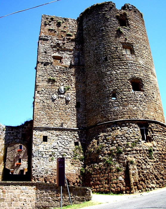 La Rocca degli Ottieri a Castell'Ottieri (GR), Tuscany (Italy)